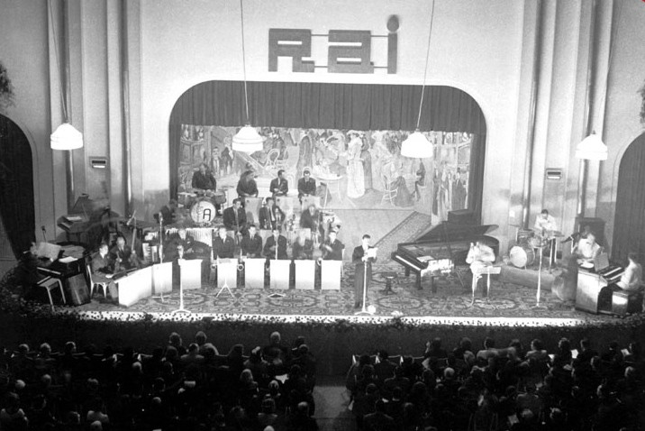 Palco del Festival di Sanremo 1955